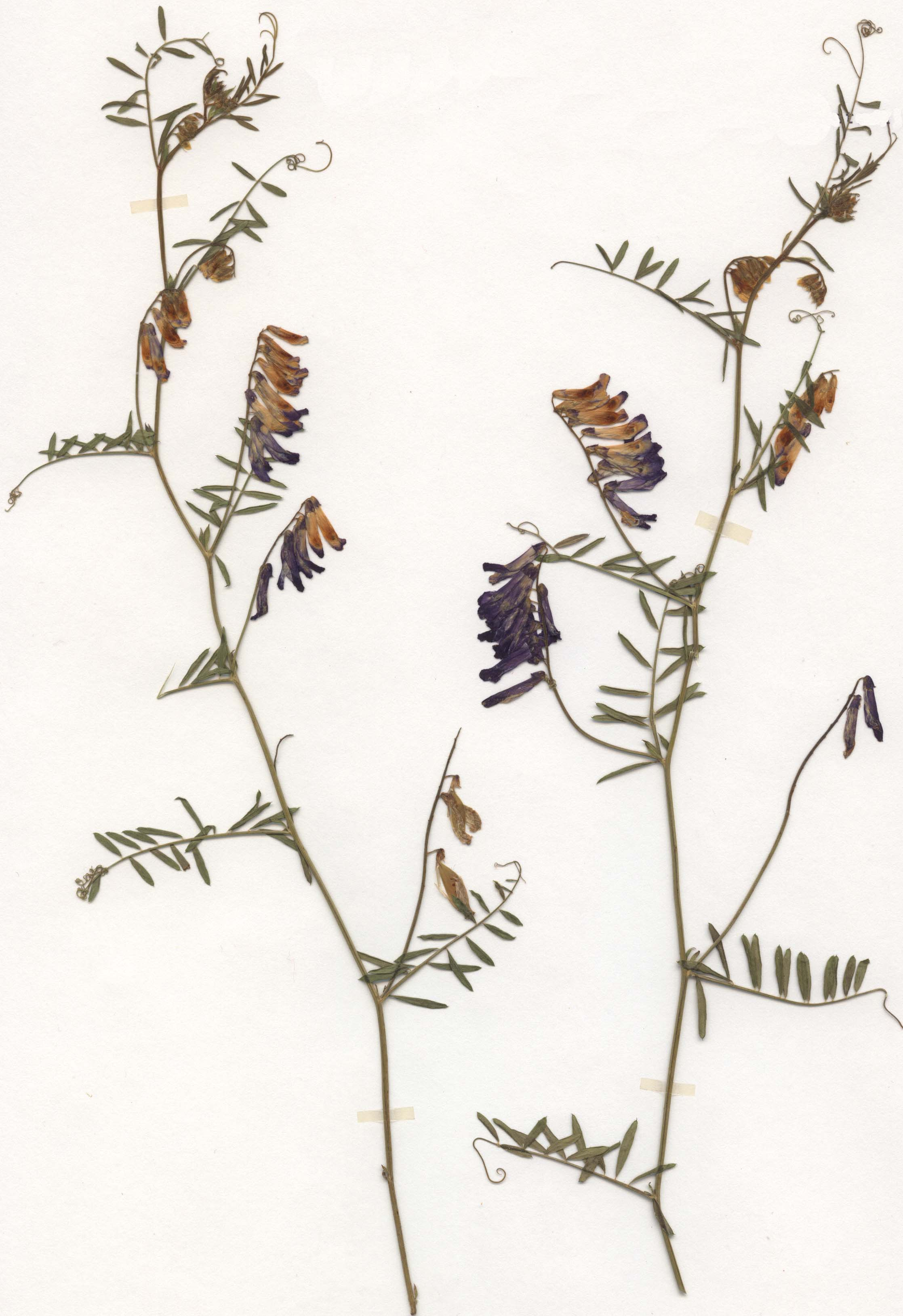 Vicia dasycarpa, eigener Herbarbeleg